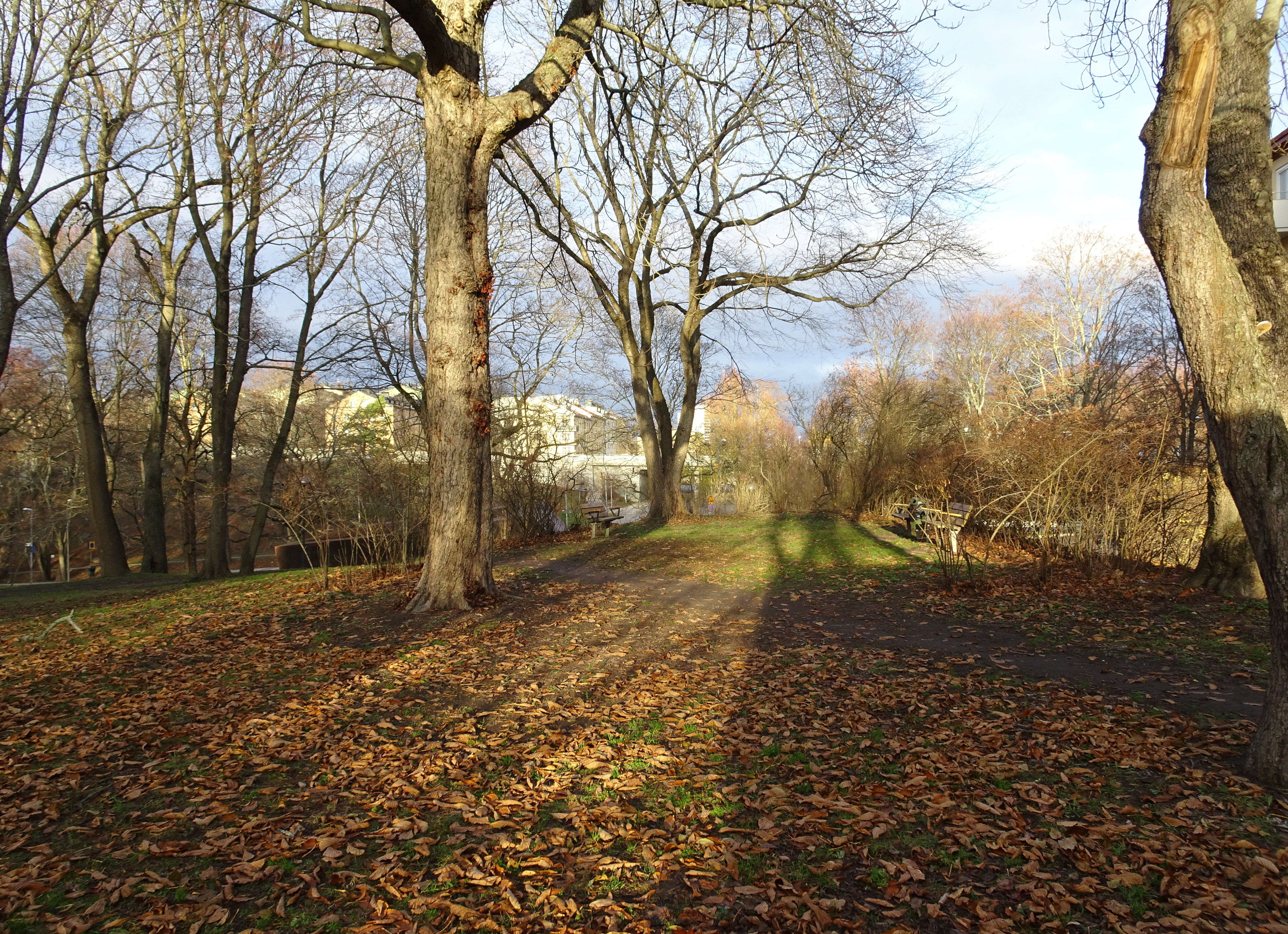 Fredhälls gamla gårdstomt, numera Tora Dahls Park.